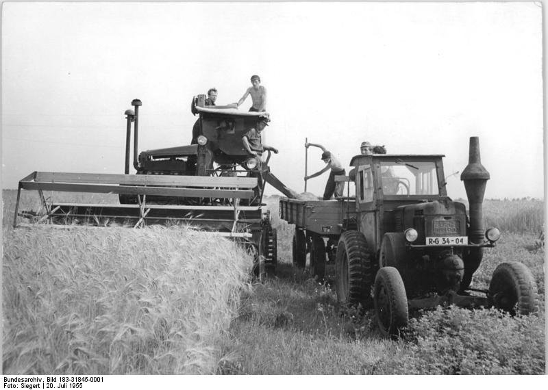 Jacobsthal, Getreideernte mit Mähdrescher Zentralbild Siegert 20.7.1955 Die Ernte hat begonnen Der Kombineführer Rathmann der MTS Strehla, Kreis Riesa, verpflichtete sich, mit seinem Mähdrescher 250 ha abzuernten. UBz: Kombineführer Rathmann erntet mit seinem Mähdrescher ein Gerstenfeld der LPG in Jacobsthal, Kreis Riesa.